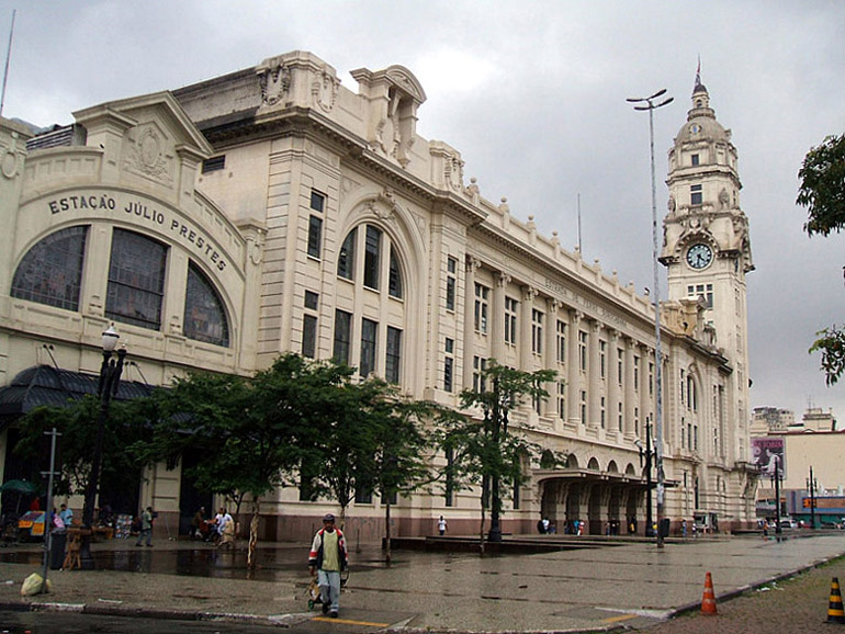 Fachada da Estação Júlio Prestes em dia chuvoso (São Paulo, Brasil)